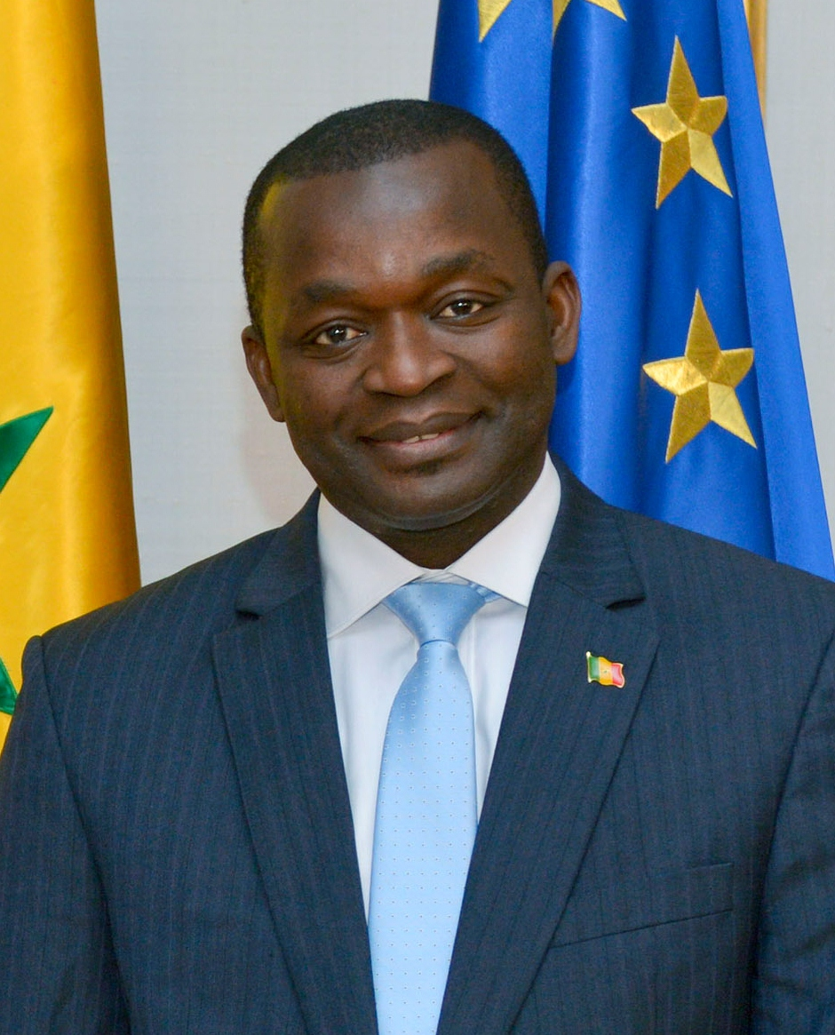 14.11.06 Ministro de Senegal 1